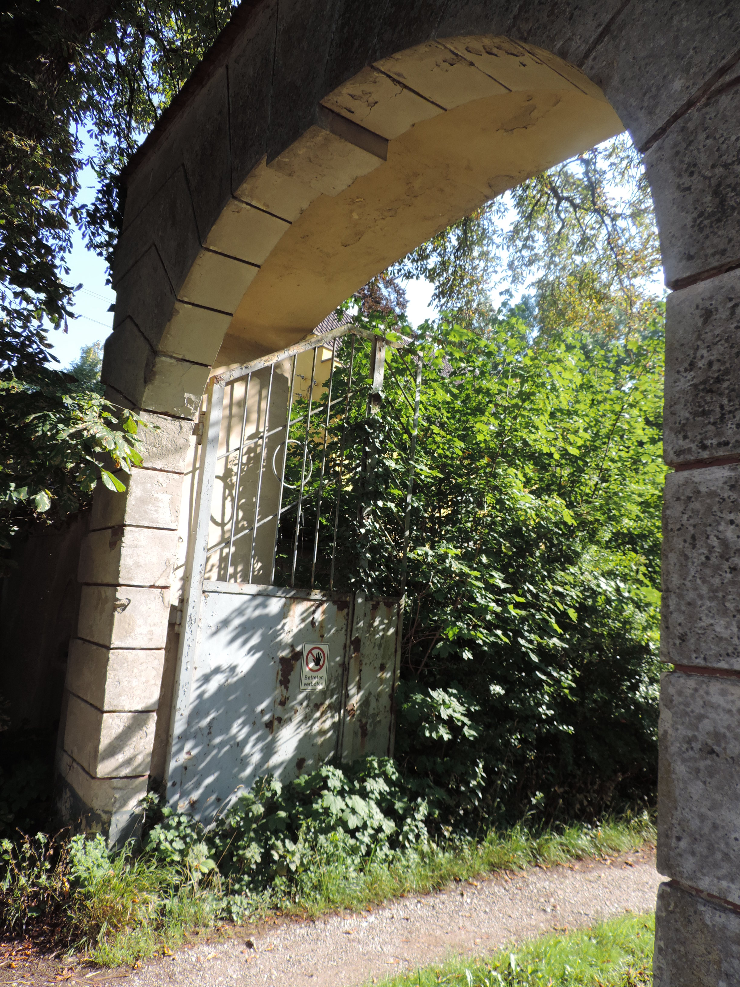 Schlosseinfahrt Schloss Gailenbach